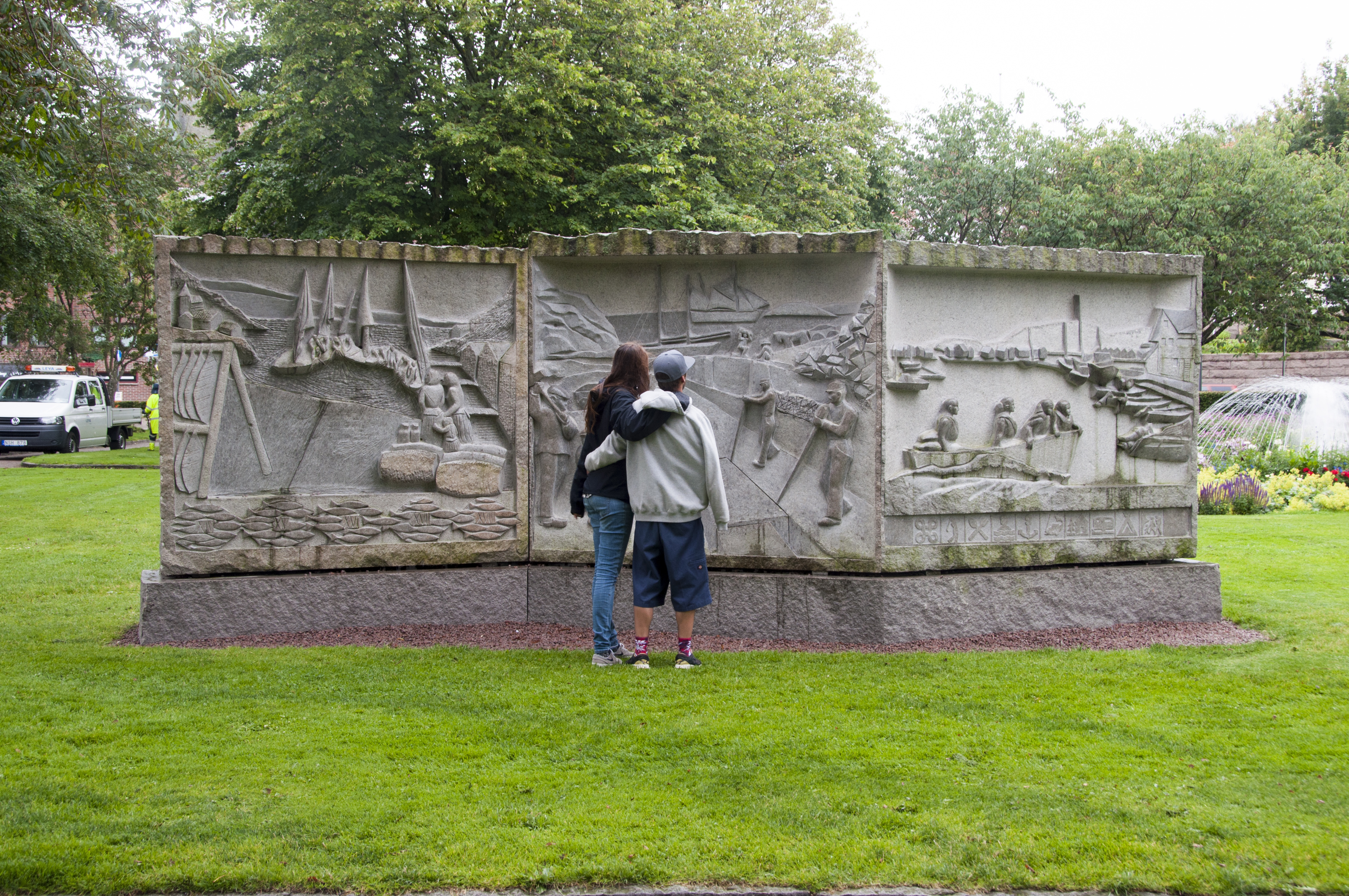 Bohuslänsk krönika i Lysekils stadspark av Ivana Machackova.Invigdes den 12/10 2013